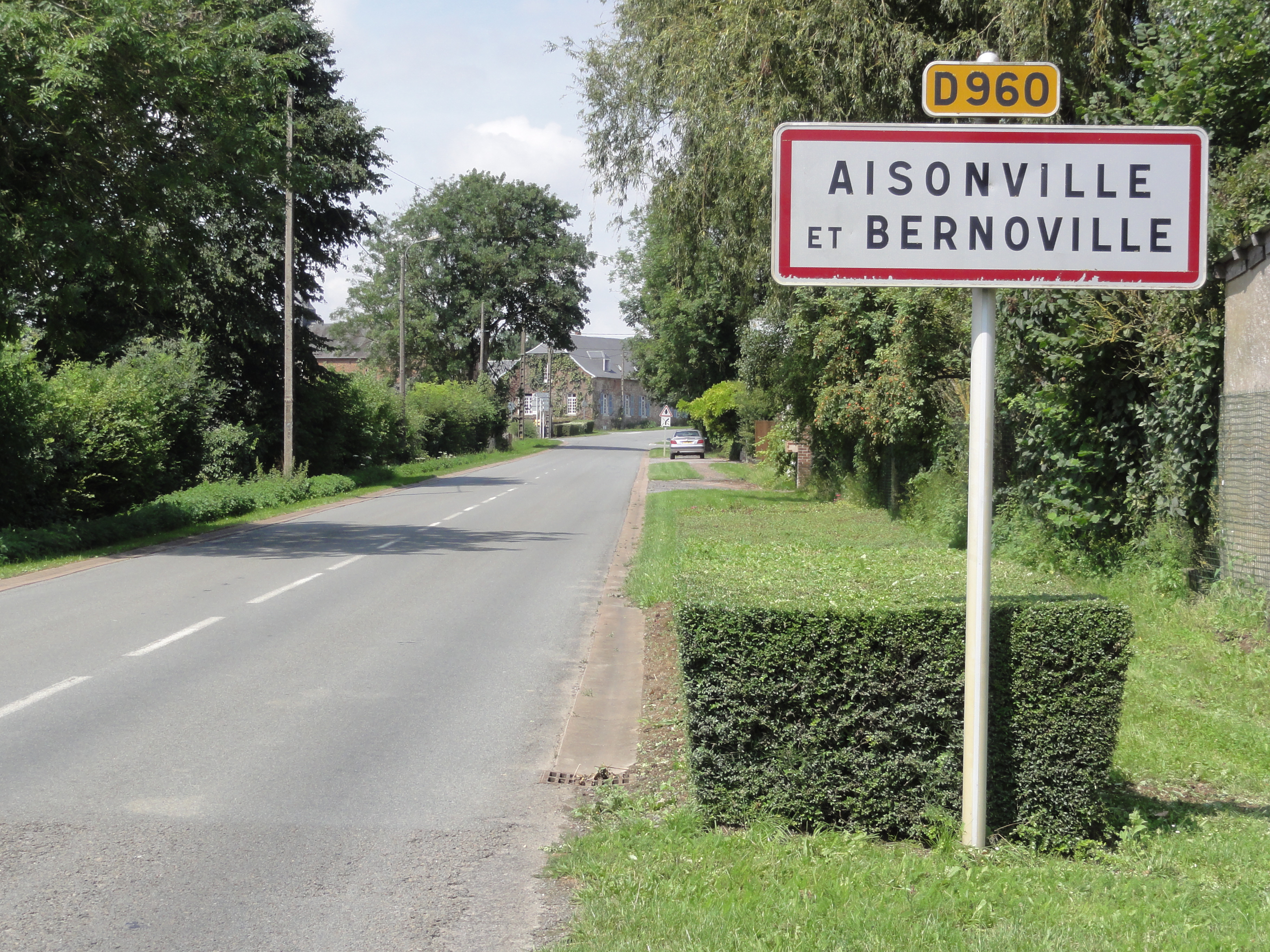 Aisonville-et-Bernoville (Aisne) city limit sign